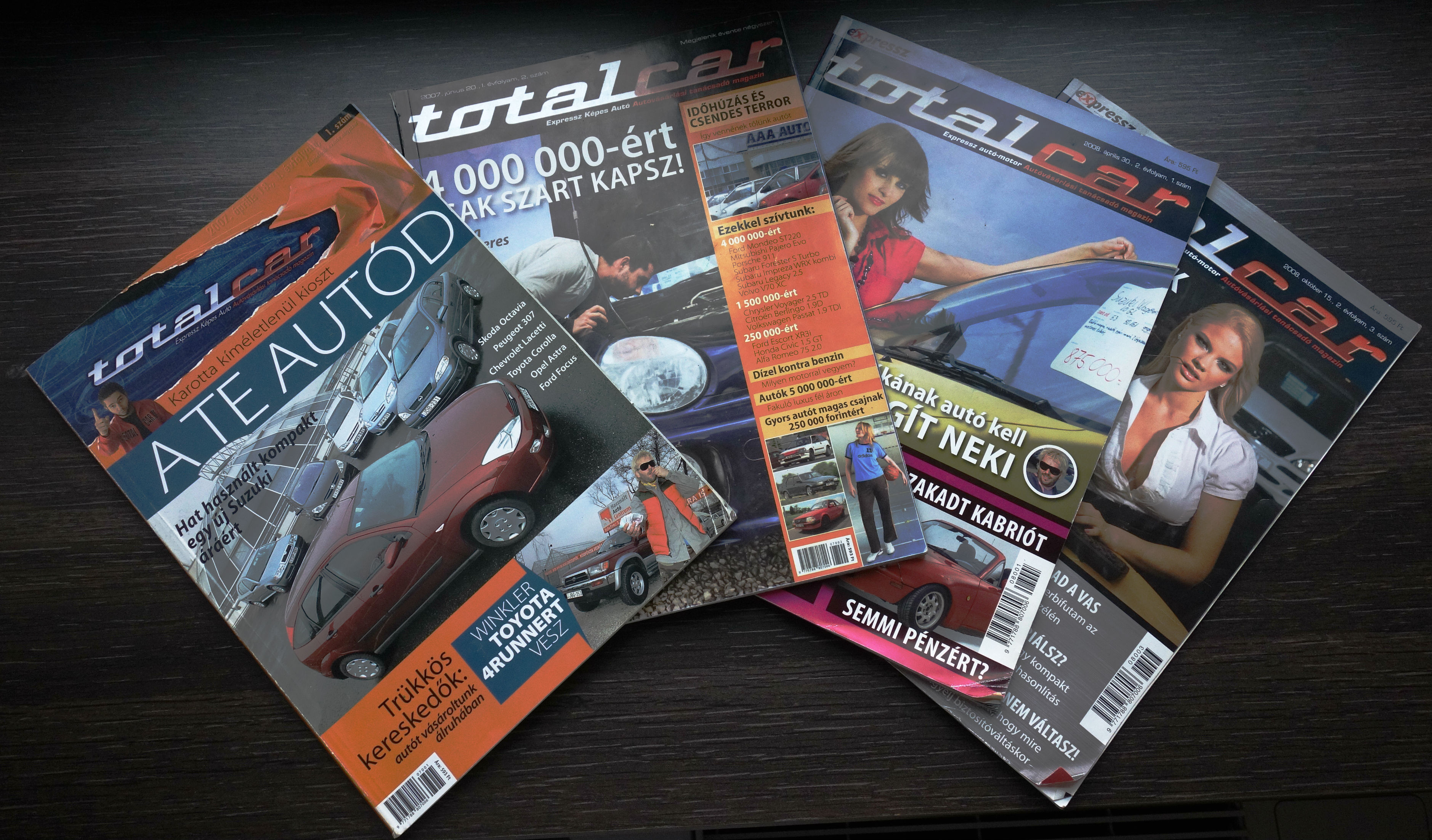 A Totalcar.hu nyomtatott kiadványainak egy része.